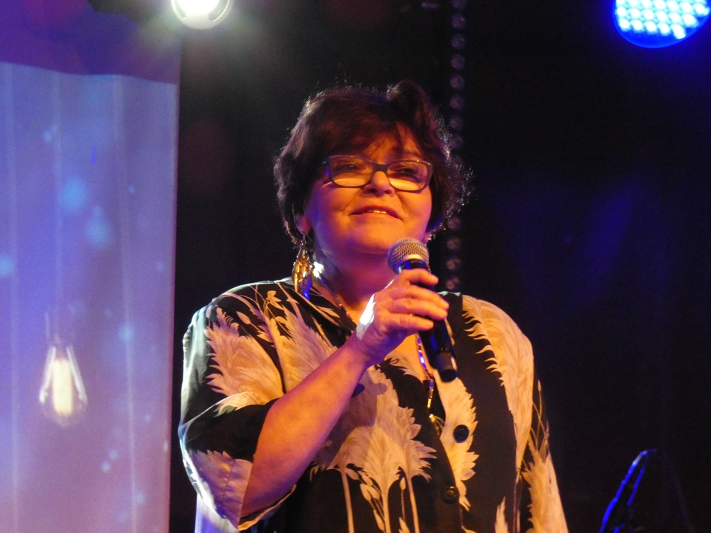 Elżbieta Adamiak podczas koncertu Kameleon Quintet w Nowej Dębie, 2019-09-07